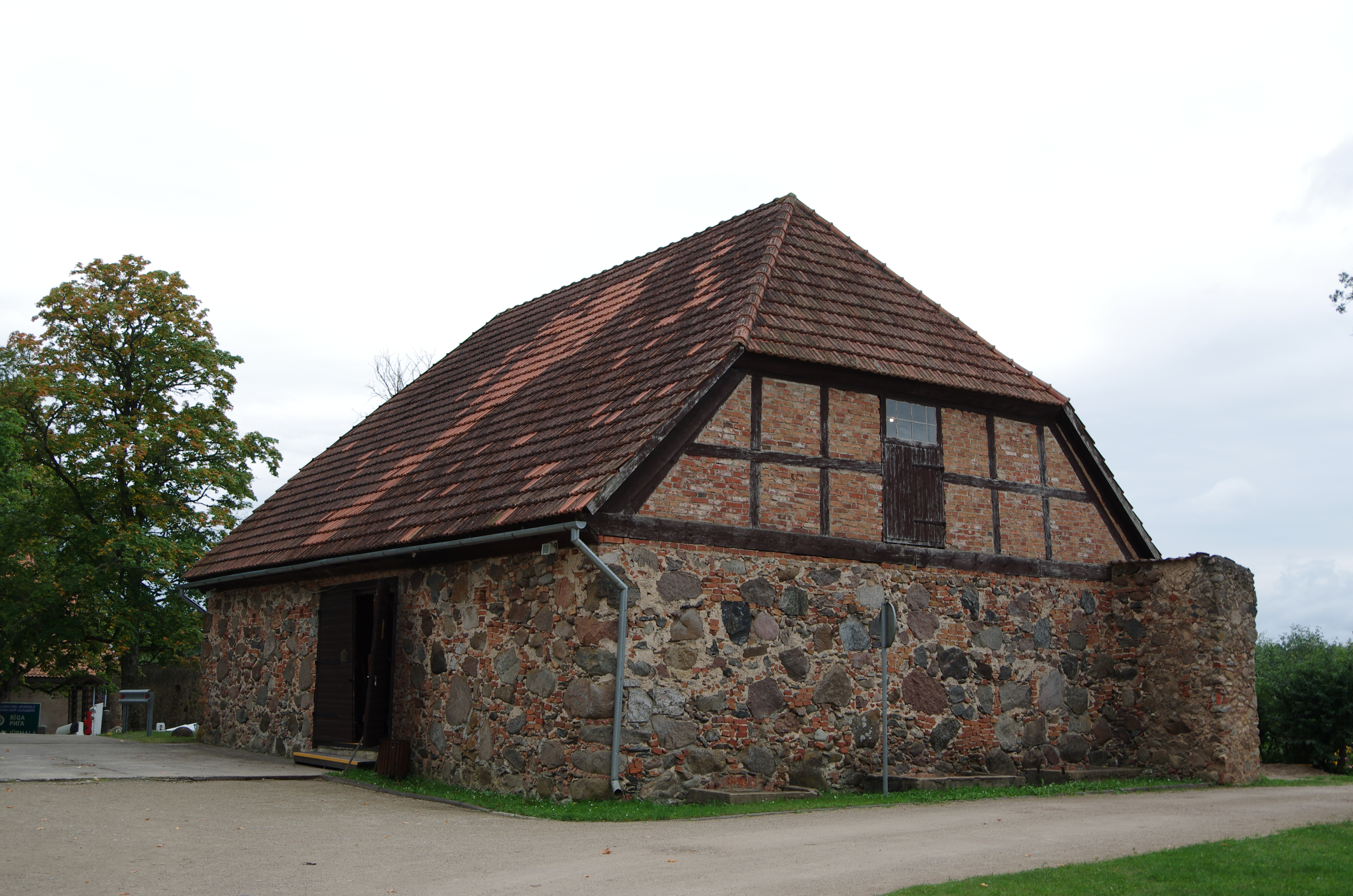 Mazā un lielā ratnīca, Milzkalne